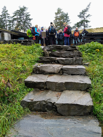 Med Nittedal Turlag til Liastua 10. oktober 2019